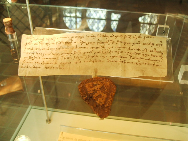 Das Foto zeigt Exponate im Kulturhistorischen Mseum in Stralsund in Stralsund im März 2007.